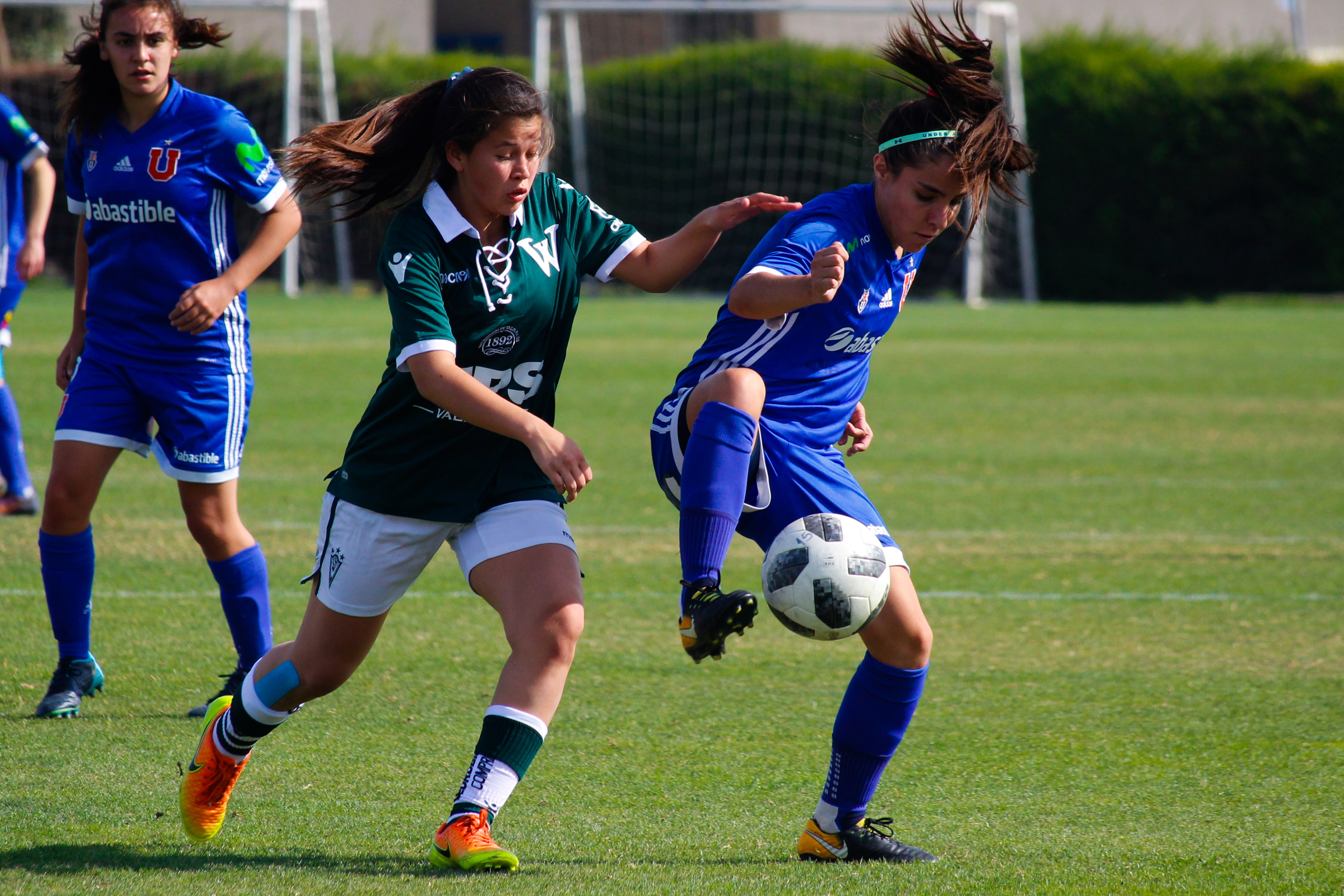 El encuentro se realizó el sábado 12 de mayo y la "U" igualó con las caturras por 1-1 en la primera fecha de Campeonato Nacional Femenino La jugadora de la U es Francisca Moroso.